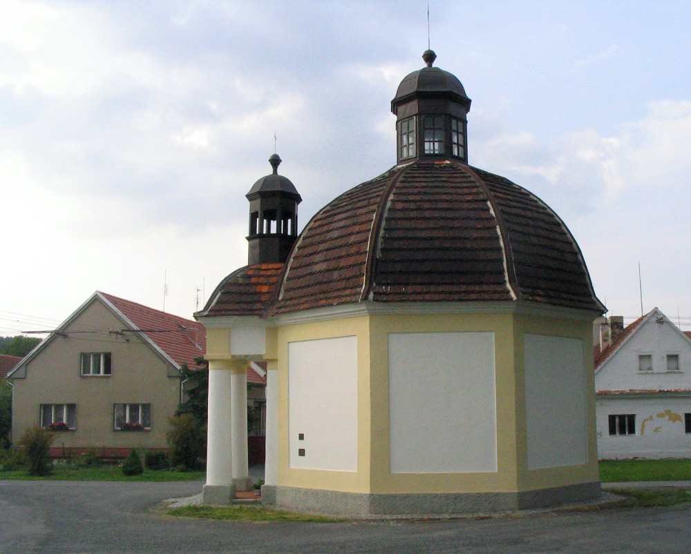 Česky: Kaple Povýšení svatého Kříže v Soběkurech.